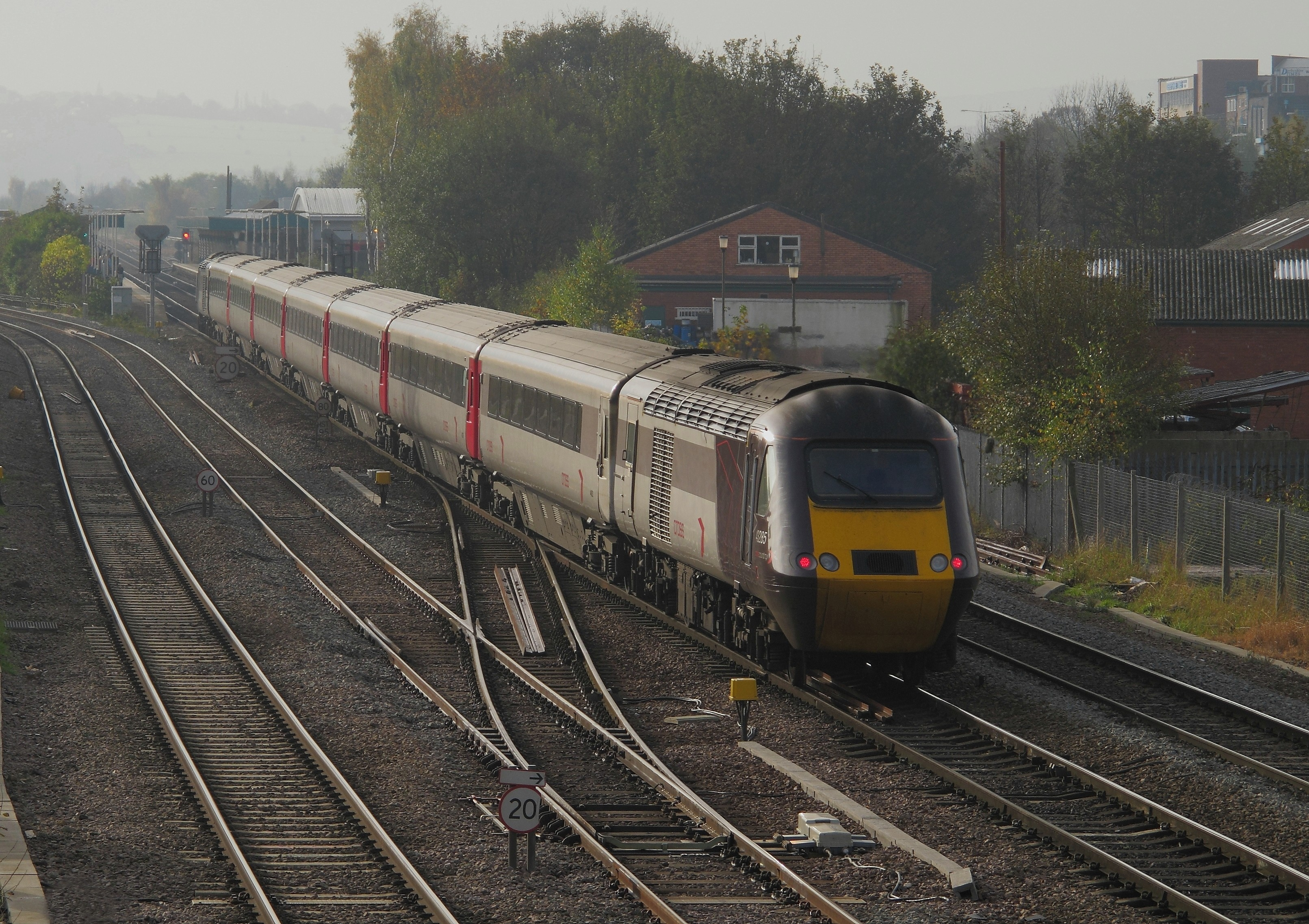 43285 Chesterfield